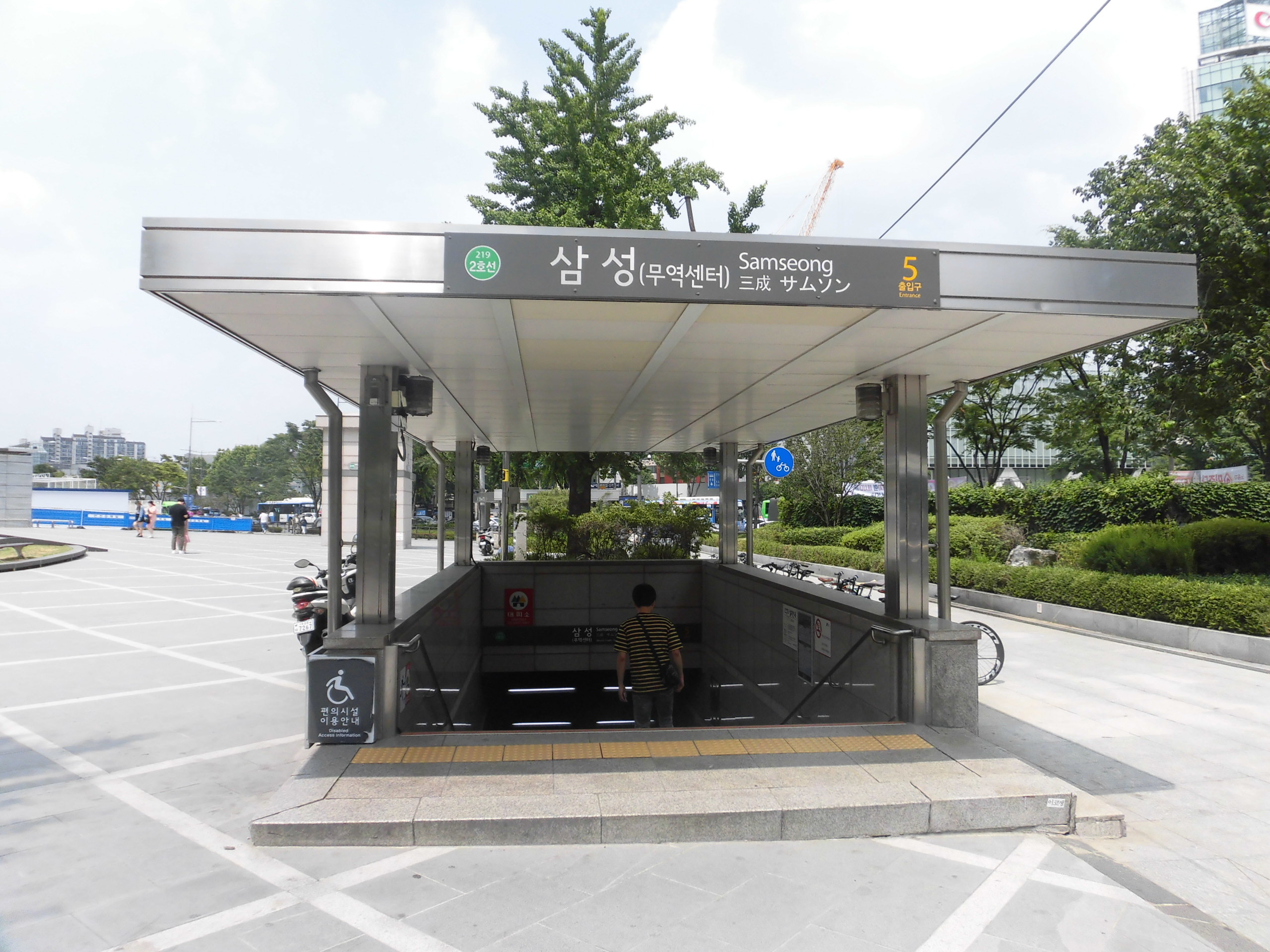 서울교통공사 2호선에 있는 삼성역 5번출구